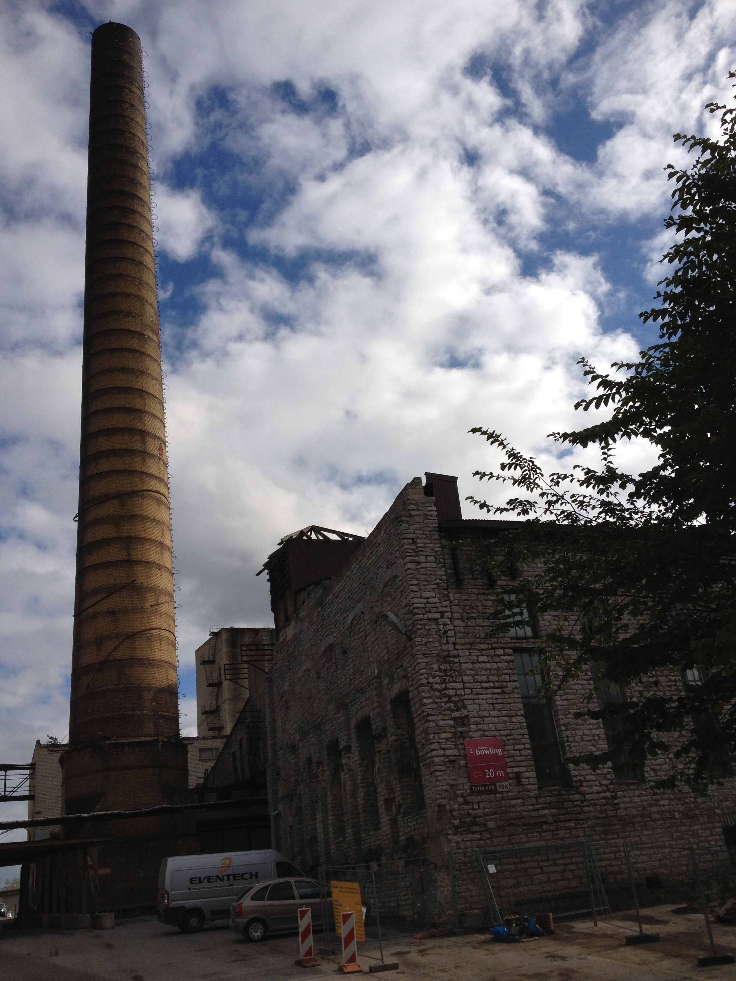 Tselluloosi- ja paberivabriku hoovipoolne tööstushoone korstnaga, 1910, 1937